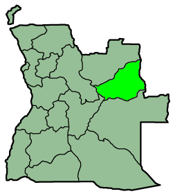 A map from province Lunda Sul, Angola